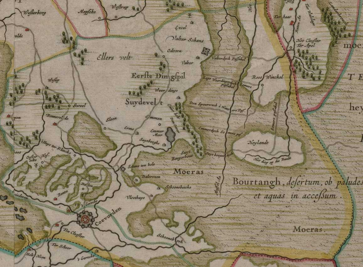 Oude kaart van Drenthe uit 1634 (fragment)